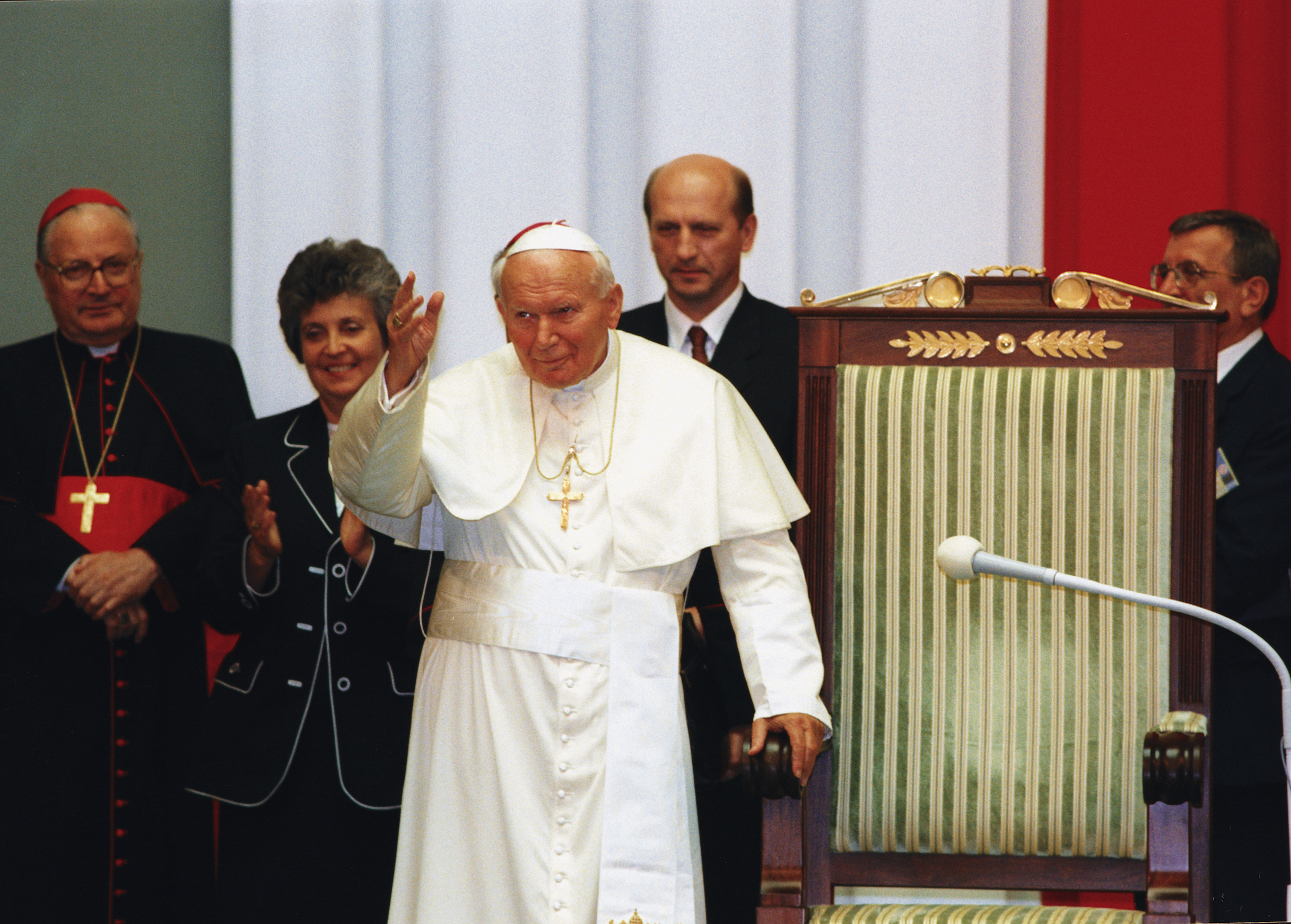 Wizyta papieża Jana Pawła II w Sejmie RP.